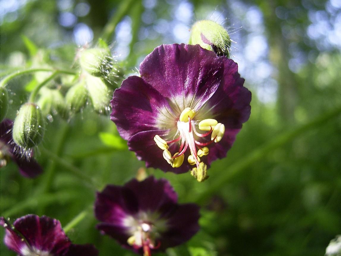 Den Haag, mei 2004, Florence Nightingalepark